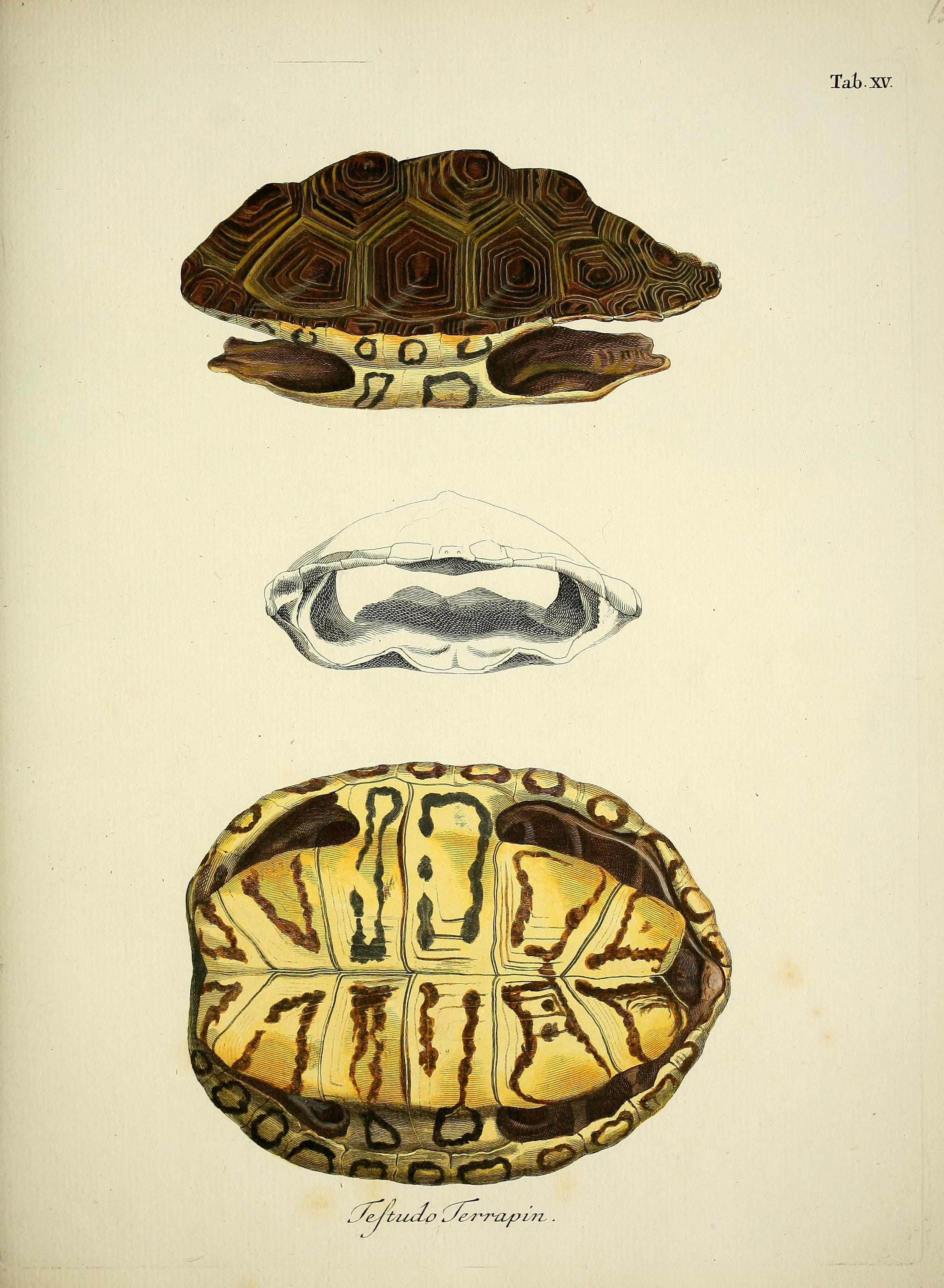 D. Johann David Schöpfs königl. Preuss. hofraths ... Naturgeschichte der Schildkröten : mit Abbildungen erläutert.